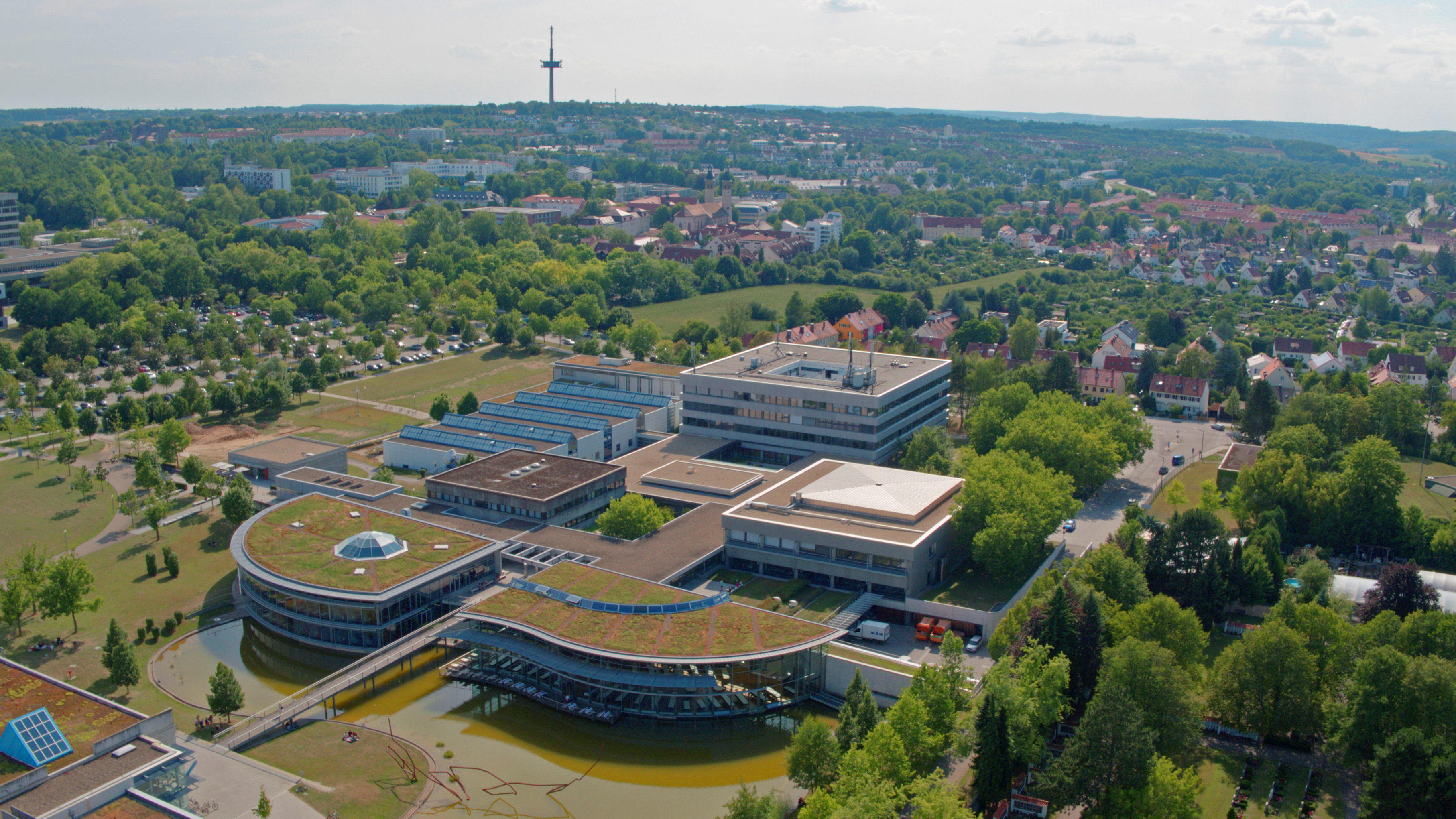 Luftaufnahme